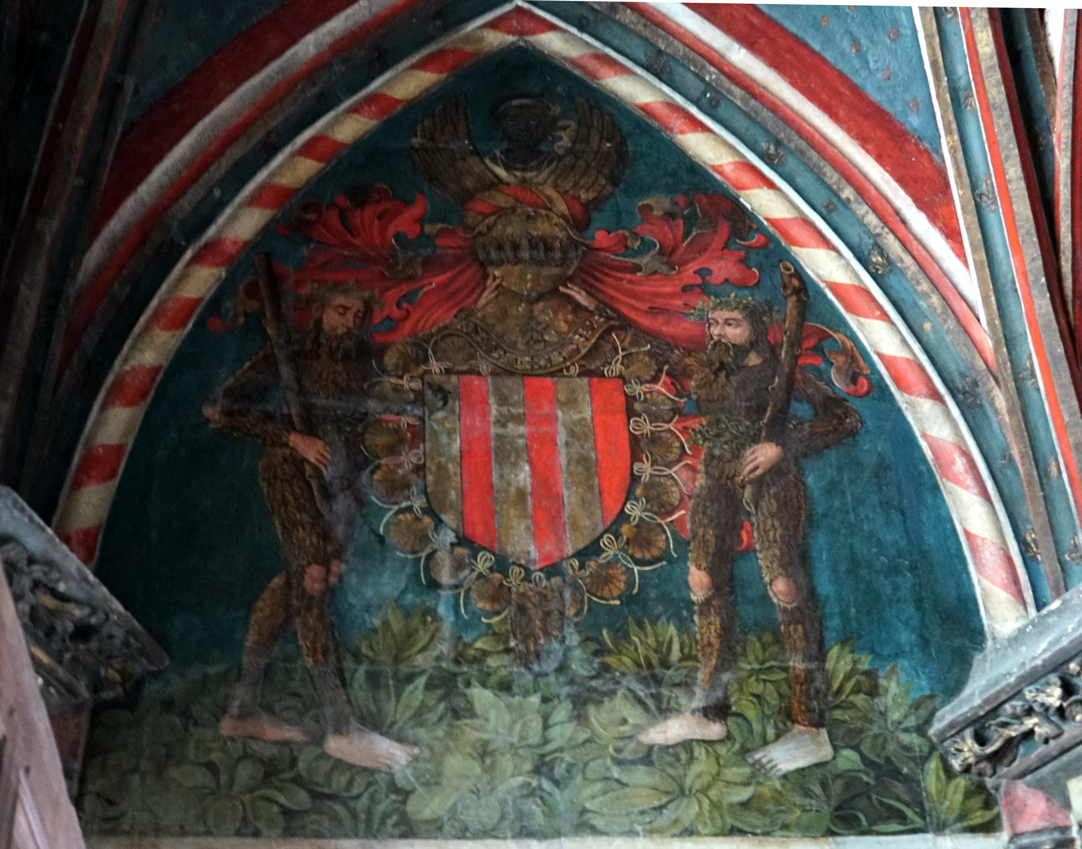 vue de l'intérieur de la chapelle.